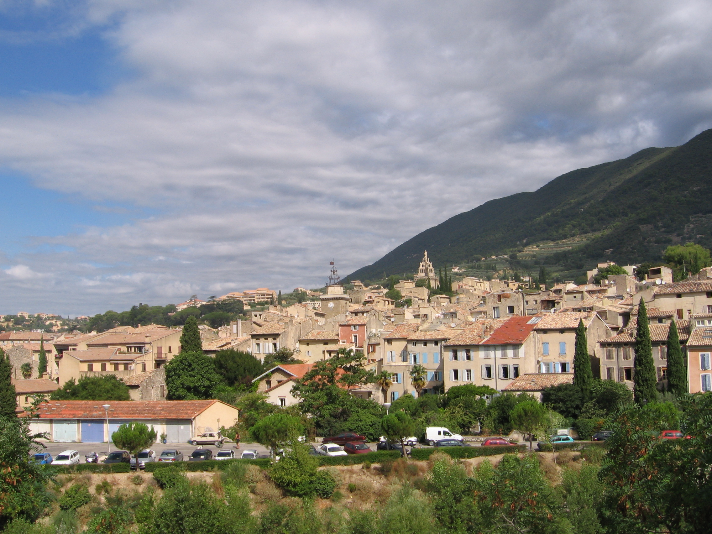 Nyons, France